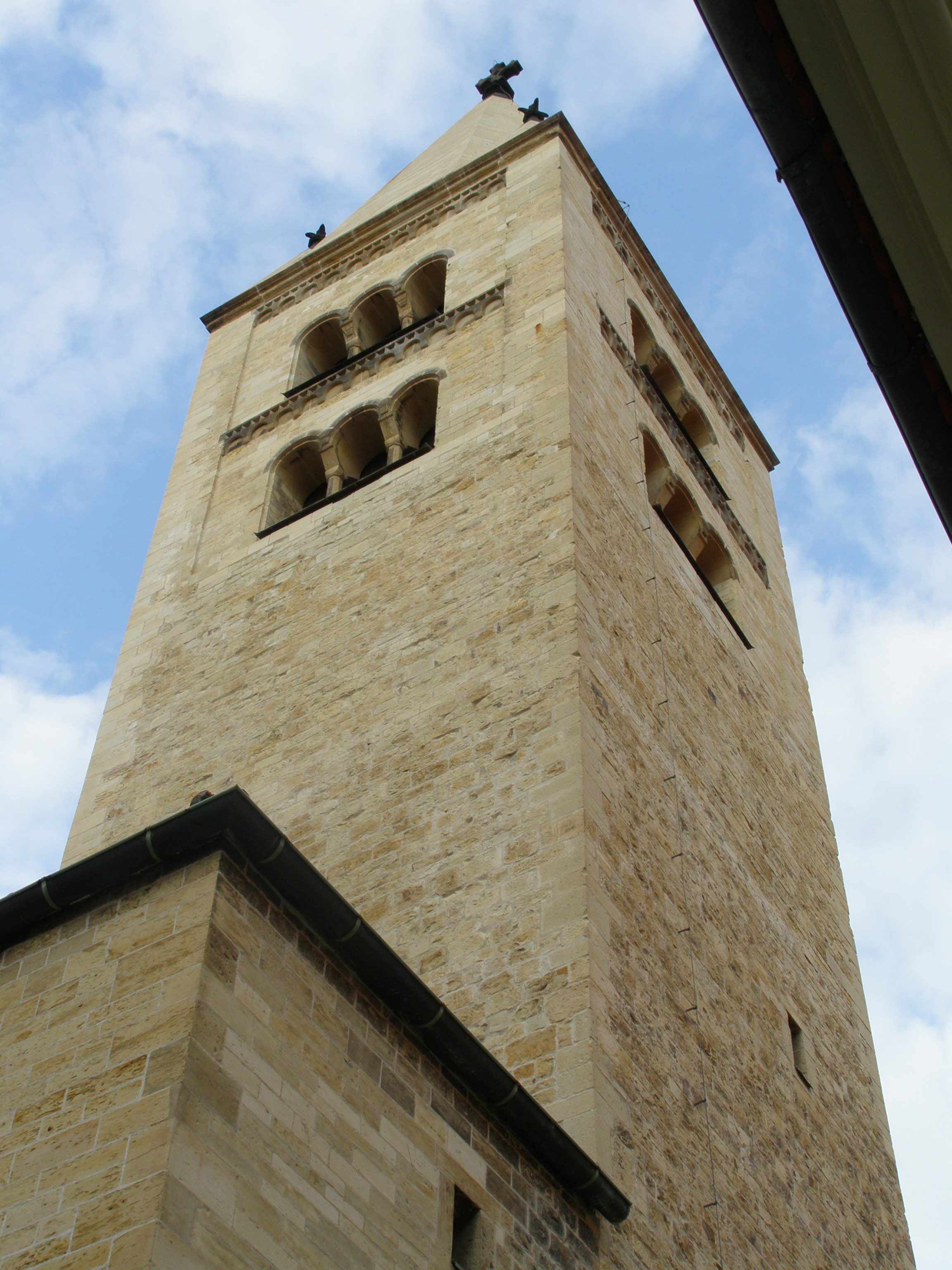 Pražský hrad, Bazilika svatého Jiří